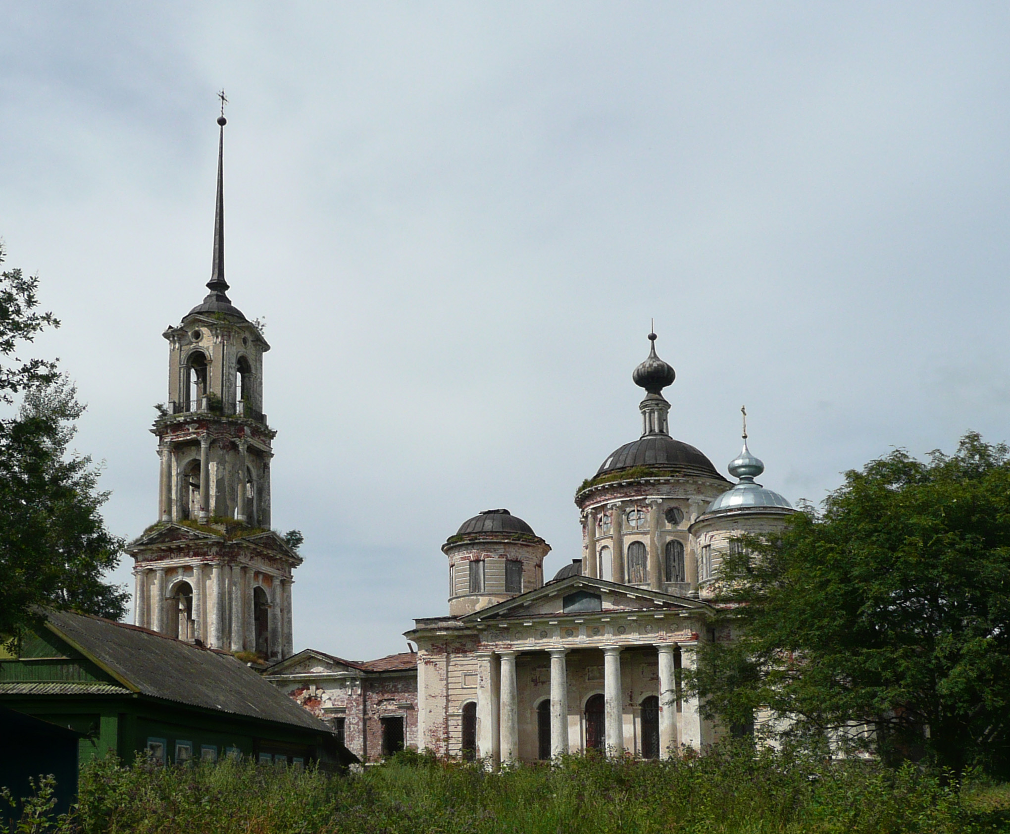 Преображенская церковь в с.Замытье